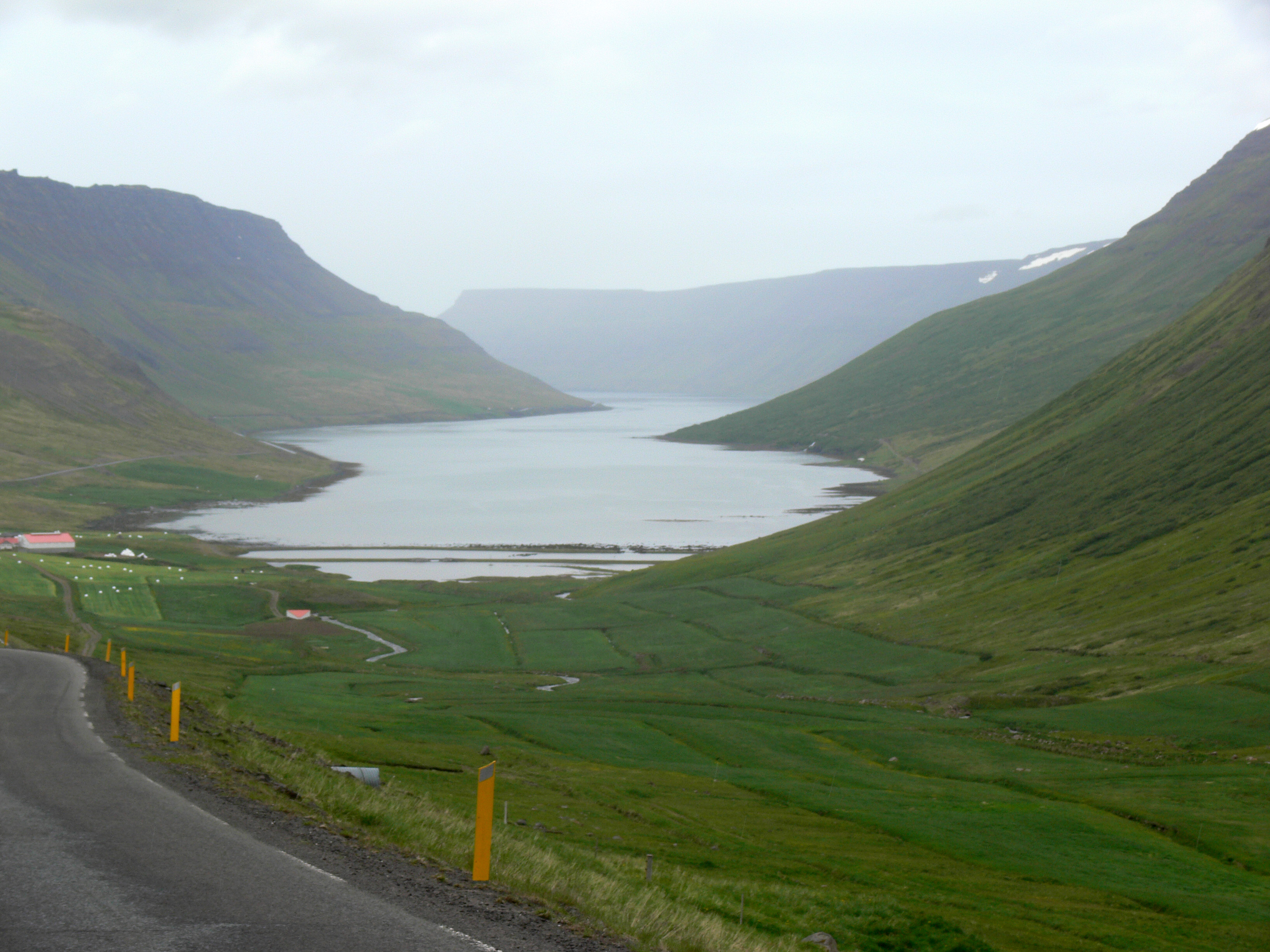 Súgandafjörður.